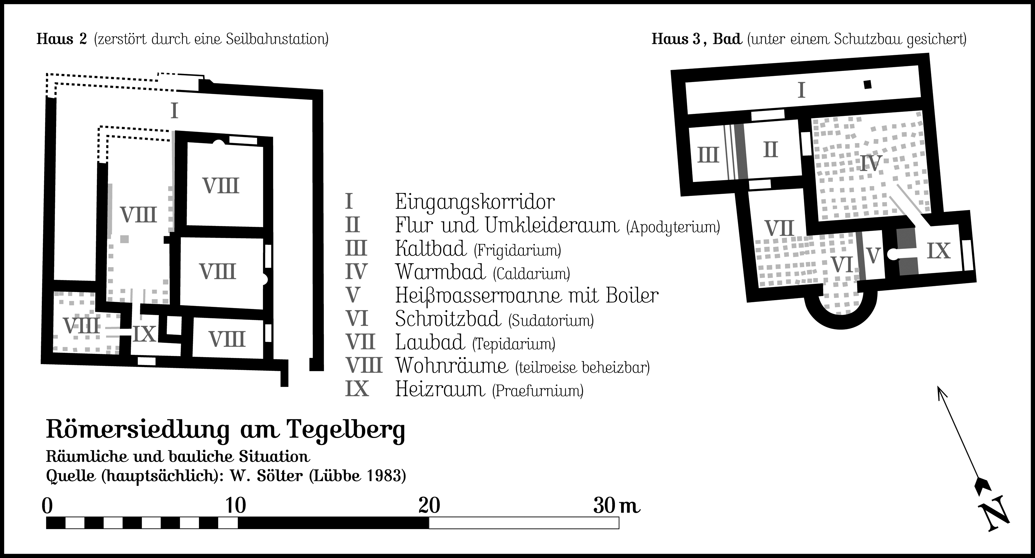 Römersiedlung Tegelberg, Haus 2 und 3 (Bad). Quelle: Walter Sölter, Lübbe, 1983